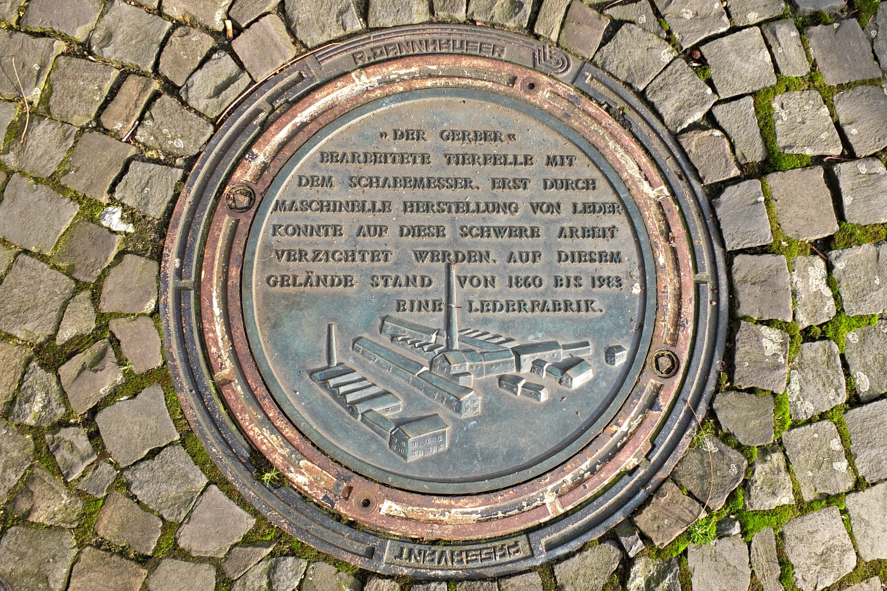 Kanaldeckel zur Plastik Der Gerber in Erinnerung an die am Standort über 120 Jahre bestehenden Lederfabriken, Hilden, Mühlenstraße 7